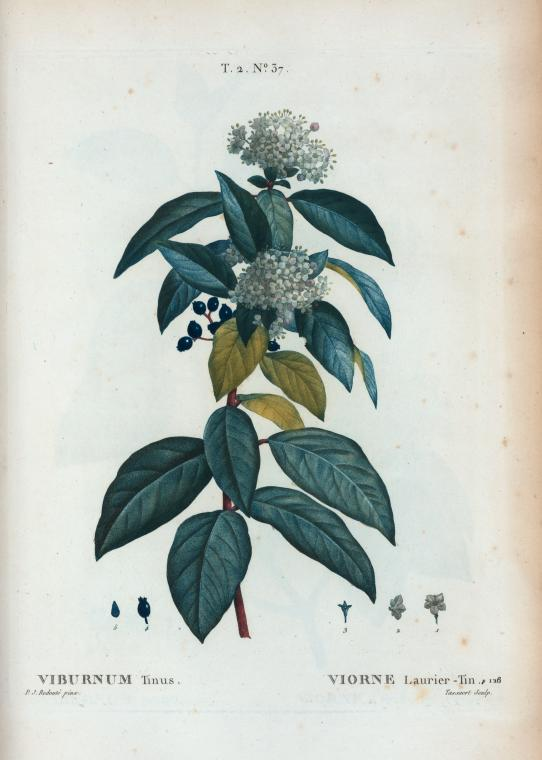 Viburnum Tinus = Viorne Laurier-tin.